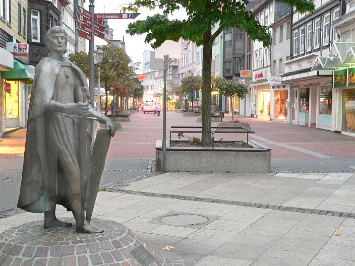 Gunzelin von Wolfenbüttel, 1223 Gründer der Stadt Peine, symbolische Statue von 1999 in Peine, nicht Abbildung der Person, da keine Abbildungen überliefert. Das Kunstwerk stammt von Wolfgang Lamché.